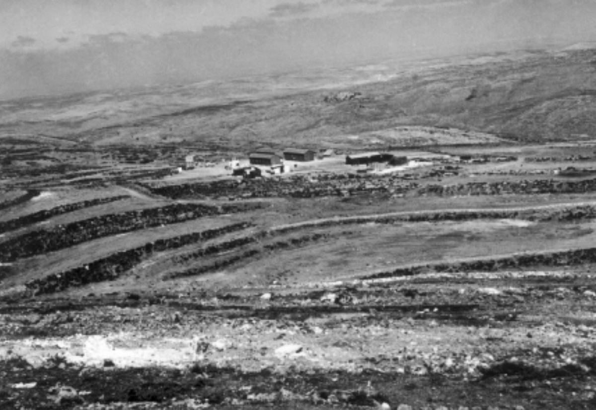 חטיבת הראל - הגדוד השישי - 2 - גוש עציון - קיבוץ השומר הצעיר רבדים - מראה כללי